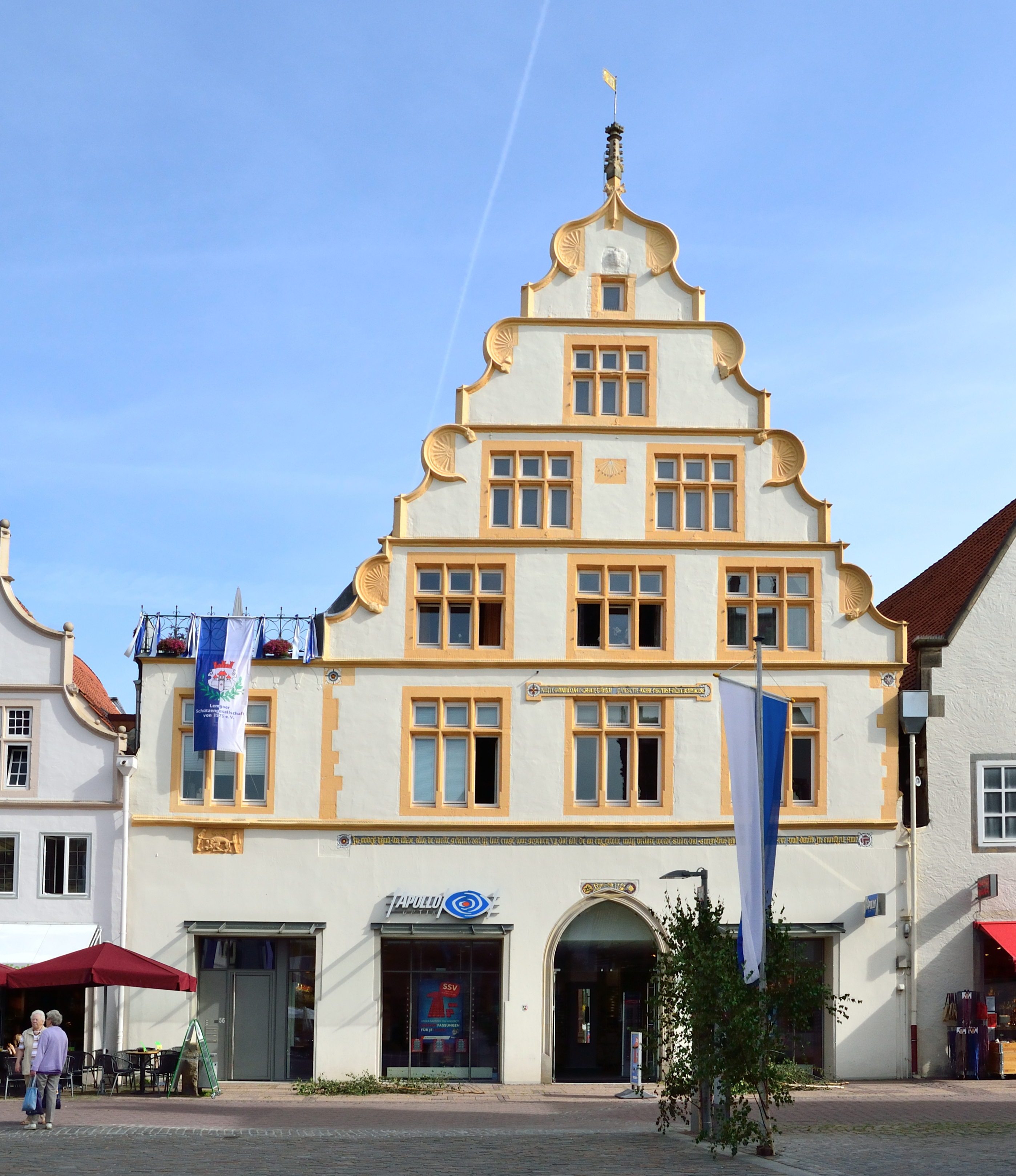 This is a photograph of an architectural monument.It is on the list of cultural monuments of Lemgo Spätgotisches Steingiebelhaus von 1556